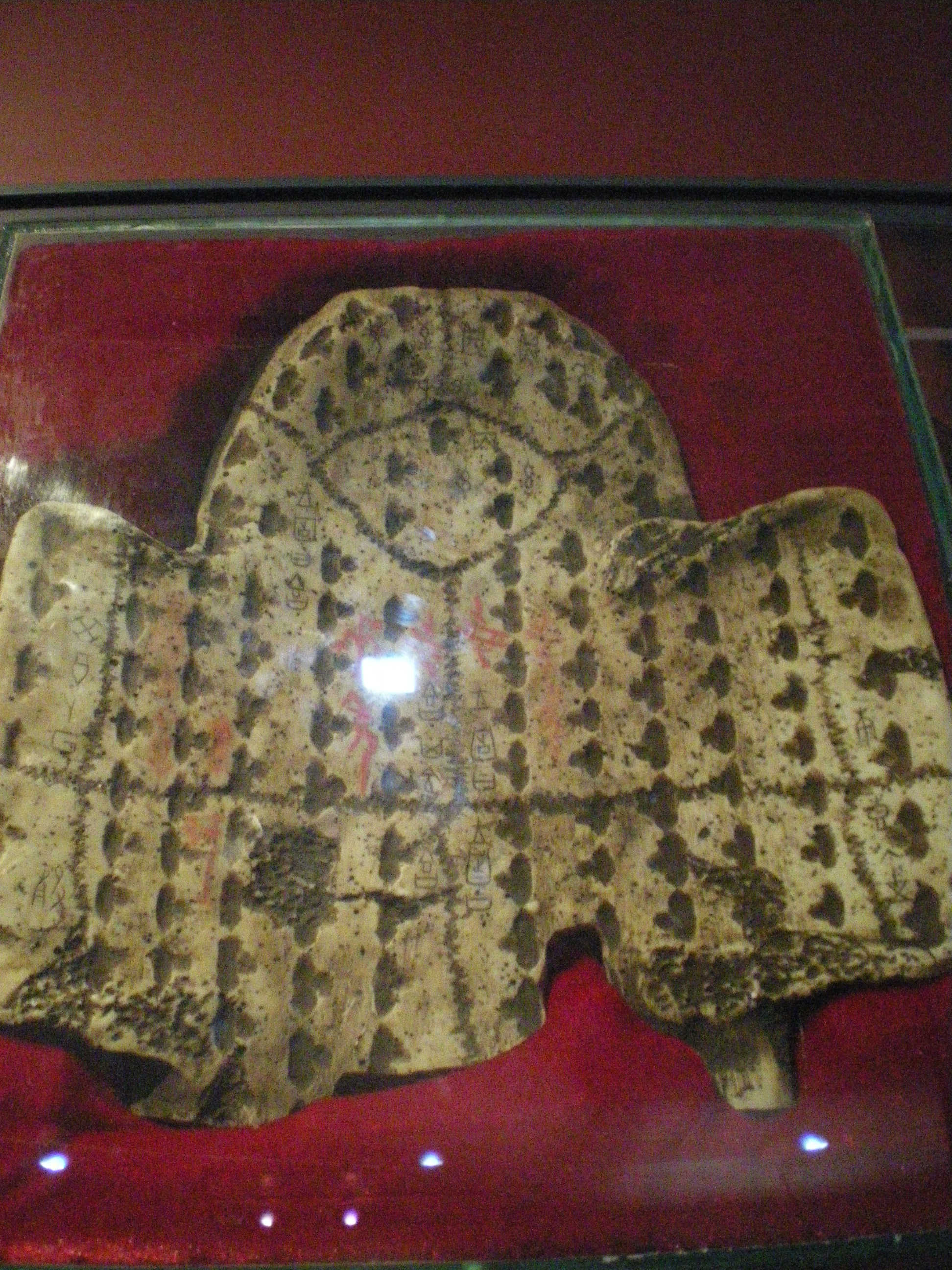 Yinxu | 殷墟